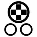 三つ輪の上の輪の内甃・丸に甃（石畳）